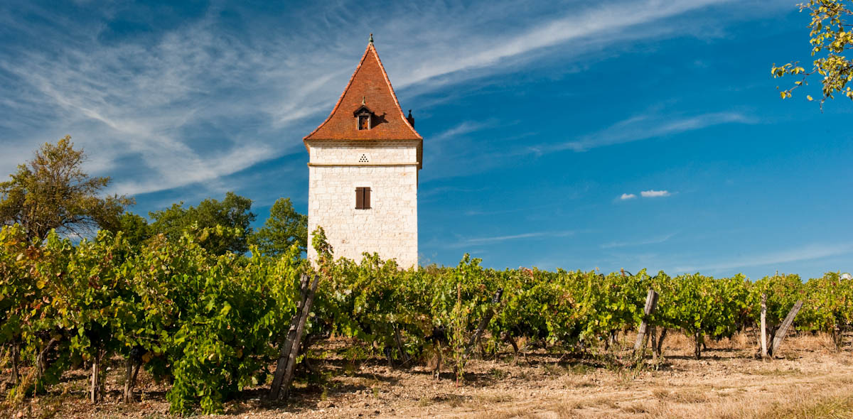 pigeonnier typique au milieu des vignes dans le Tarn